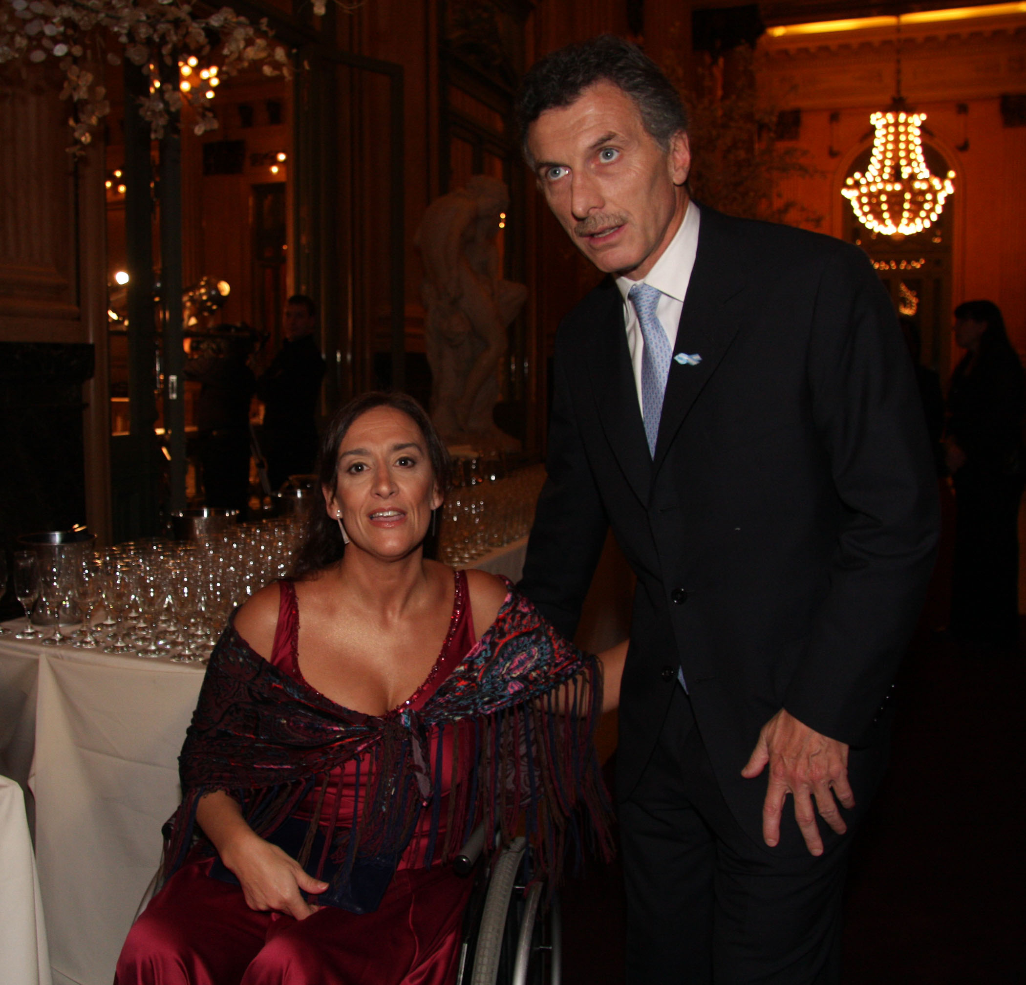 Gala de reapertura del Teatro Colón. Gabriela Michetti y Mauricio Macri.